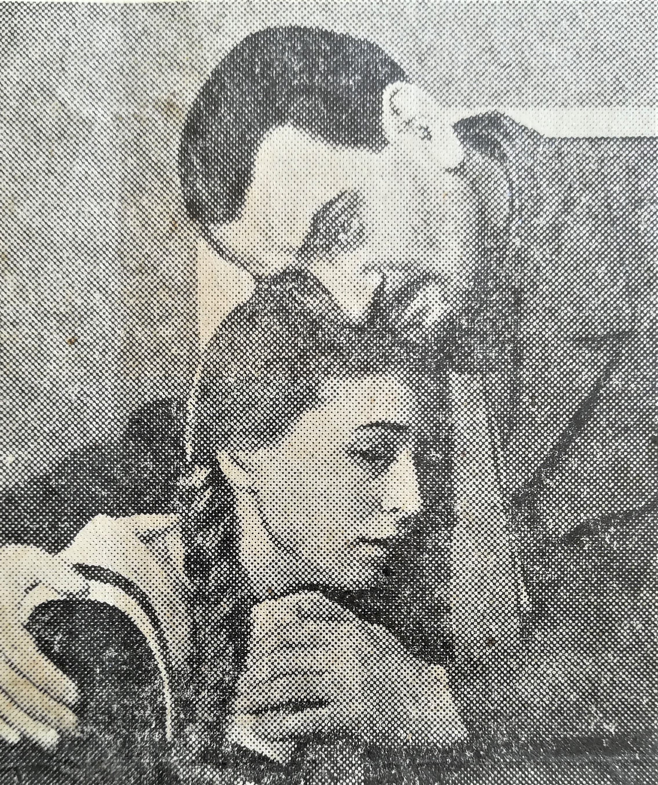 "Ocalenie Jakuba" Zawieyskiego: Mikołajska i Madaliński w 1947 r. (Kraków).